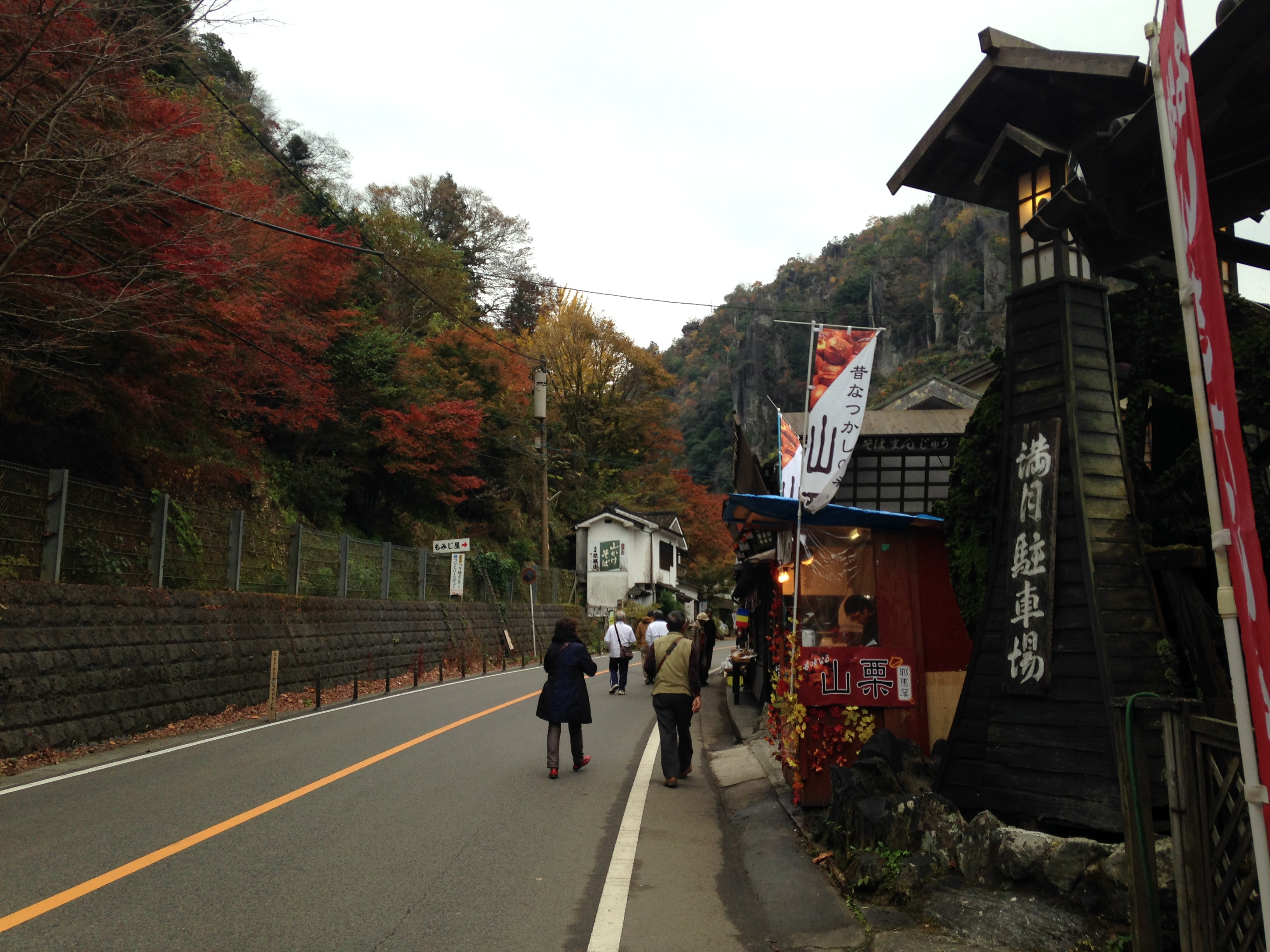 深耶馬渓・一目八景付近を通る大分県道28号